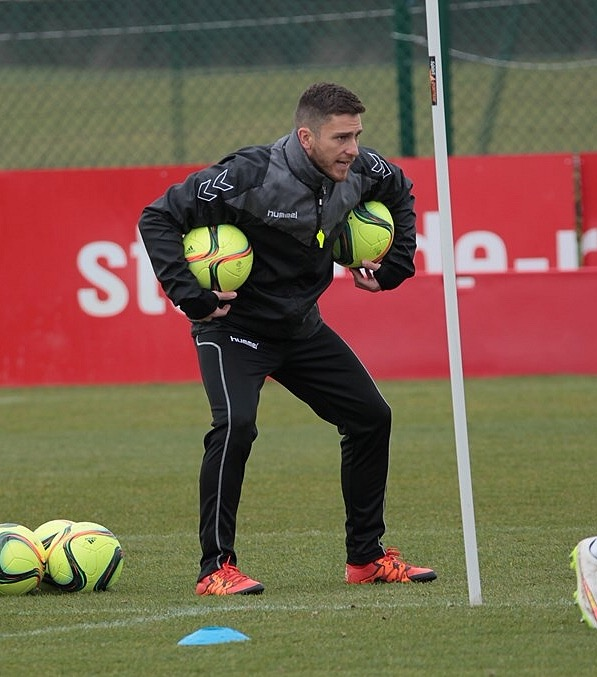 Florent Ghisolfi en séance d'entraînement